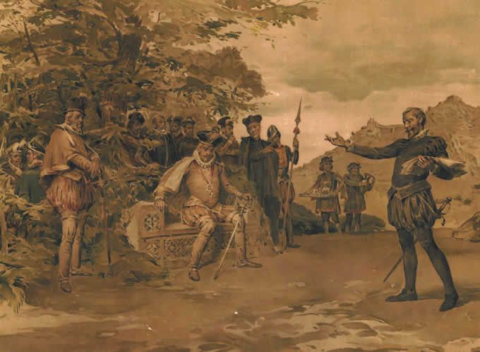 Litografia de António Ramalho